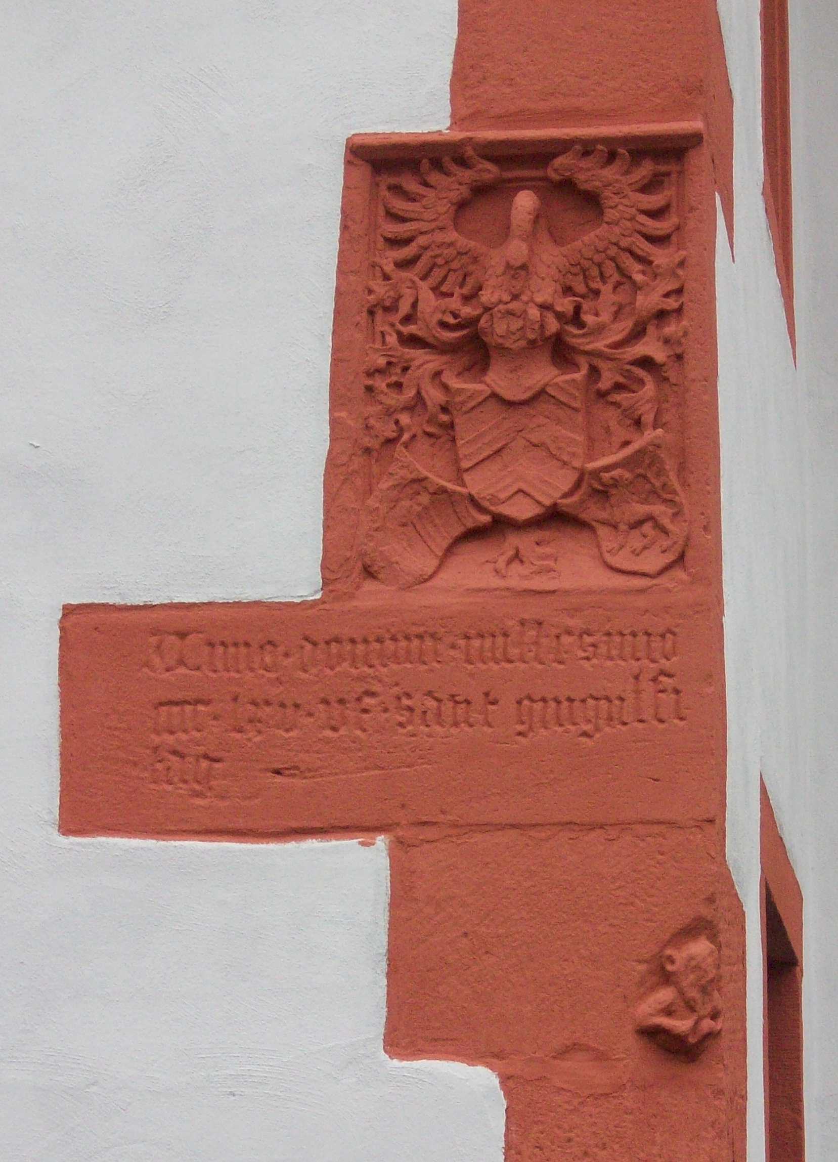 Das Hanauer Wappen mit Spruch und Eckstein (als Neidstein ein Affe) am Darmstädter Schloss (ehemals Hanauer Schloss) in Groß-Umstadt